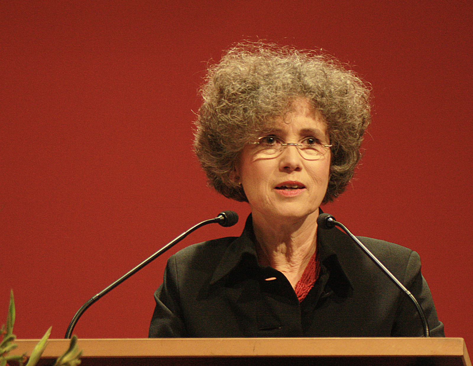 Mercedes Riederer, * 1952 in München, deutsche Journalistin Hier am 20.10.2010 im Literaturhaus in München, nachdem sie den Publizistikpreis der Stadt München erhalten hatte, während ihrer Dankesrede.